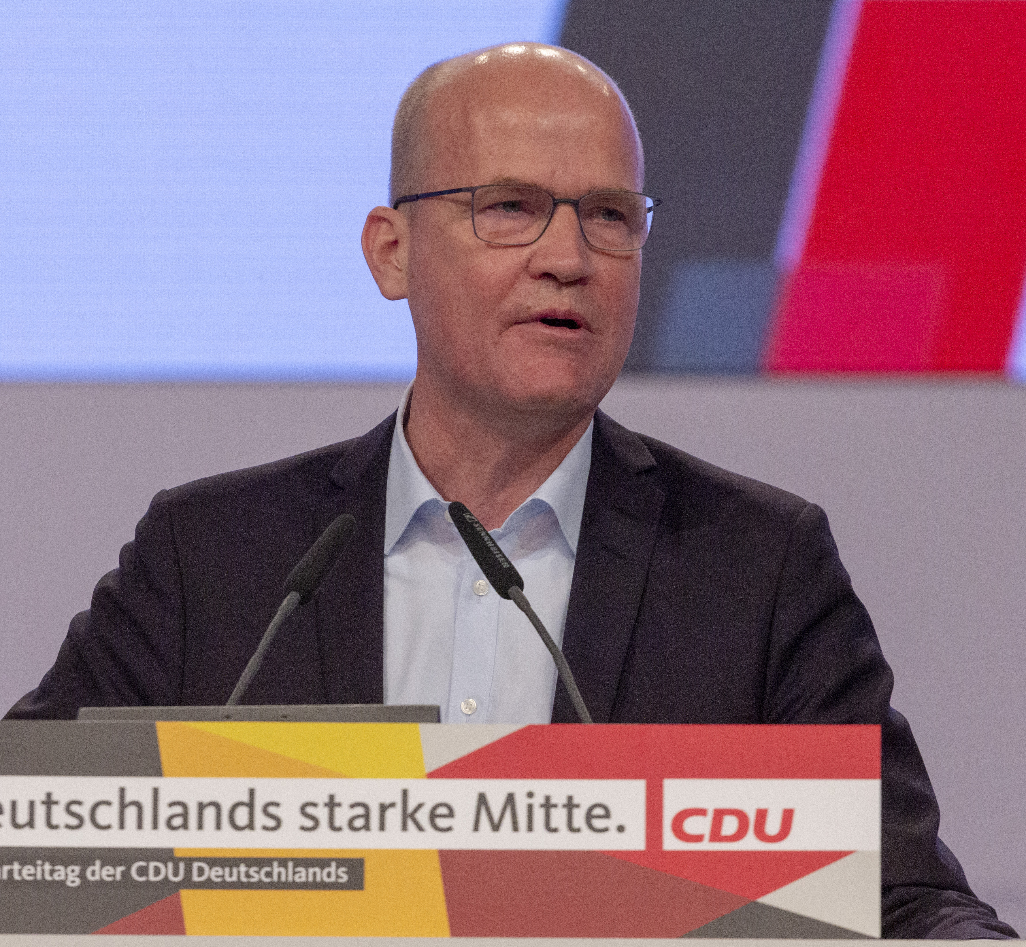 Ralph Brinkhaus auf dem CDU Parteitag 2019 am 22. November 2019 in Leipzig.